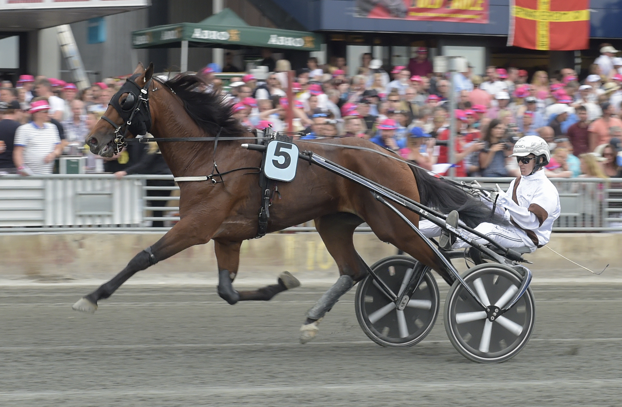 Foto: Lars Jakobsson/Kanal 75 Solvalla 20170528 Dijon heat